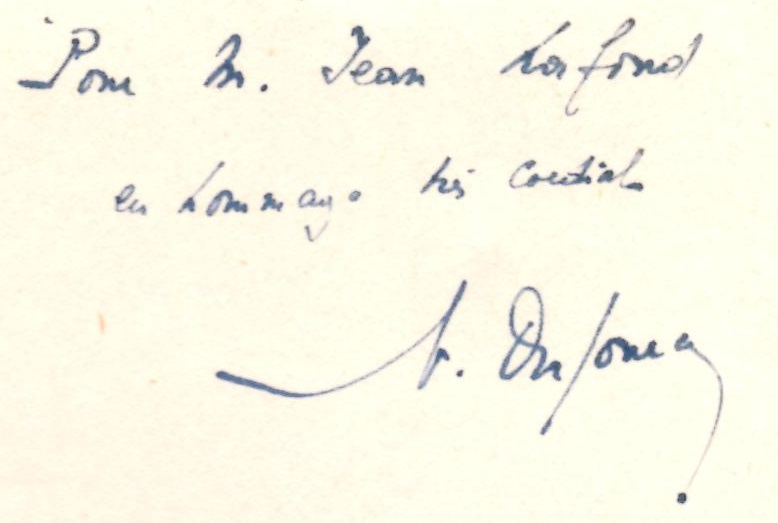 Dédicace de Norbert Dufourcq